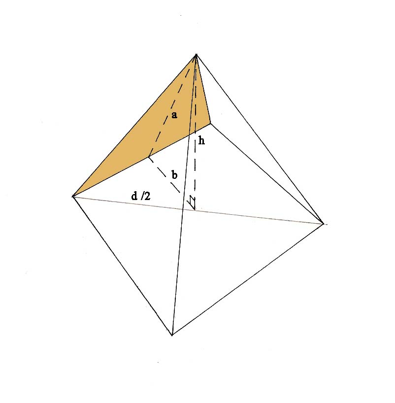 Relations de surfaces de la pyramide de Khéops